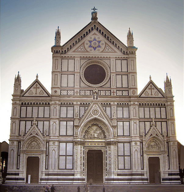 La facciata neogotica della Chiesa di Santa Croce a Firenze.